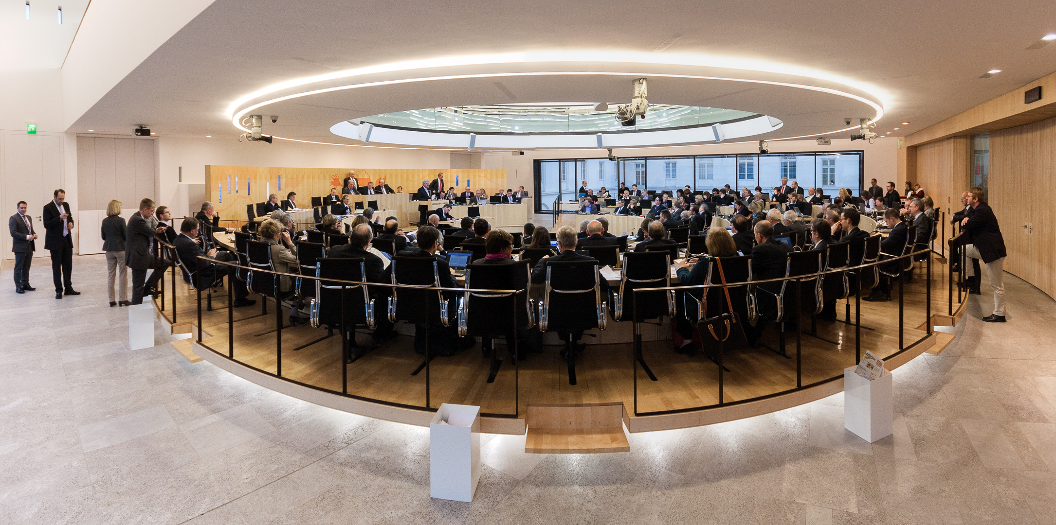 Plenum des Hessischen Landtags